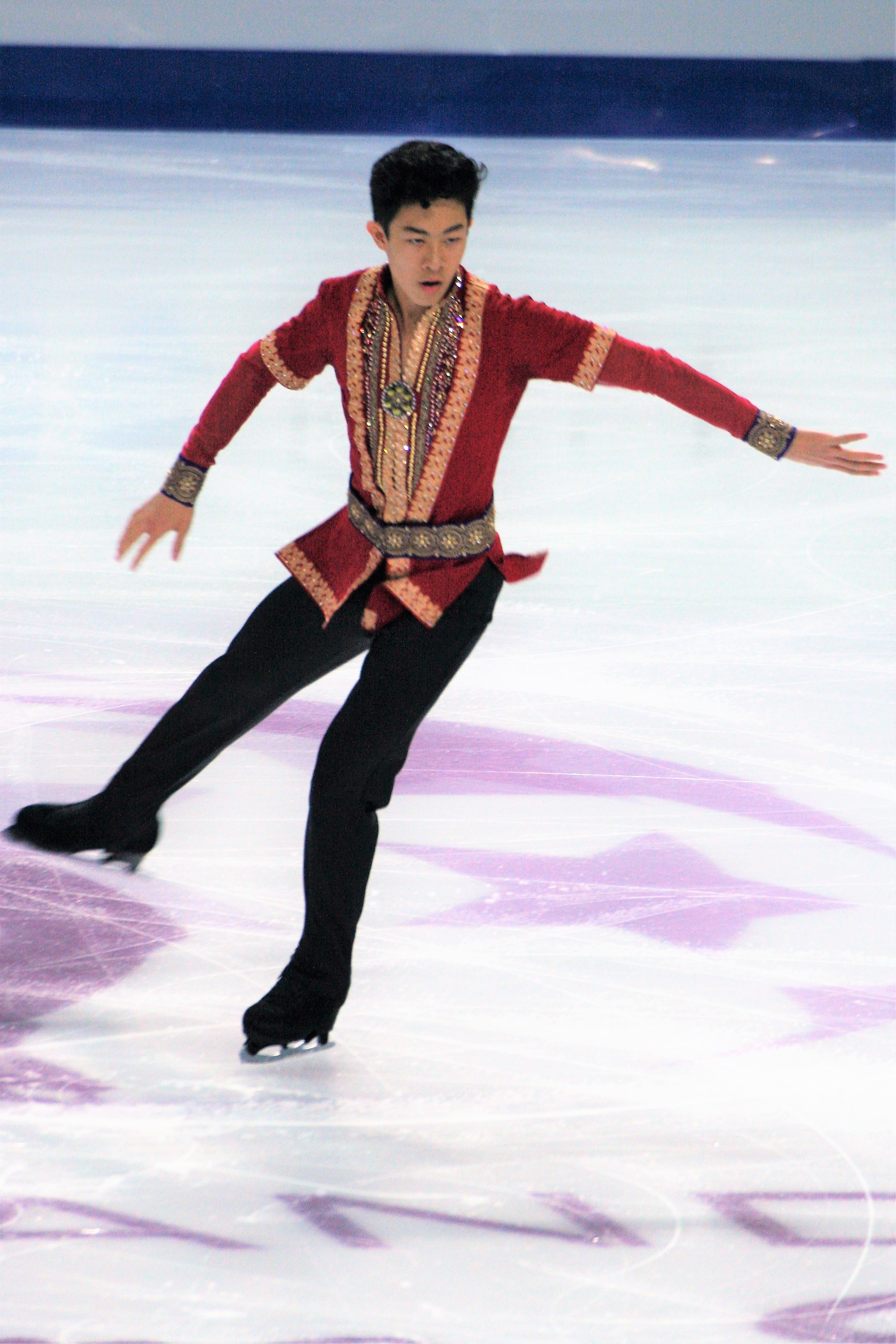 Нейтан Чен (США) на финале Гран-при по фигурному катанию 2016-2017